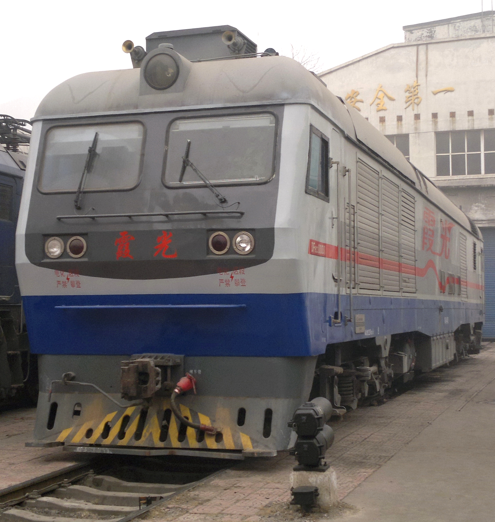 霞光号近照